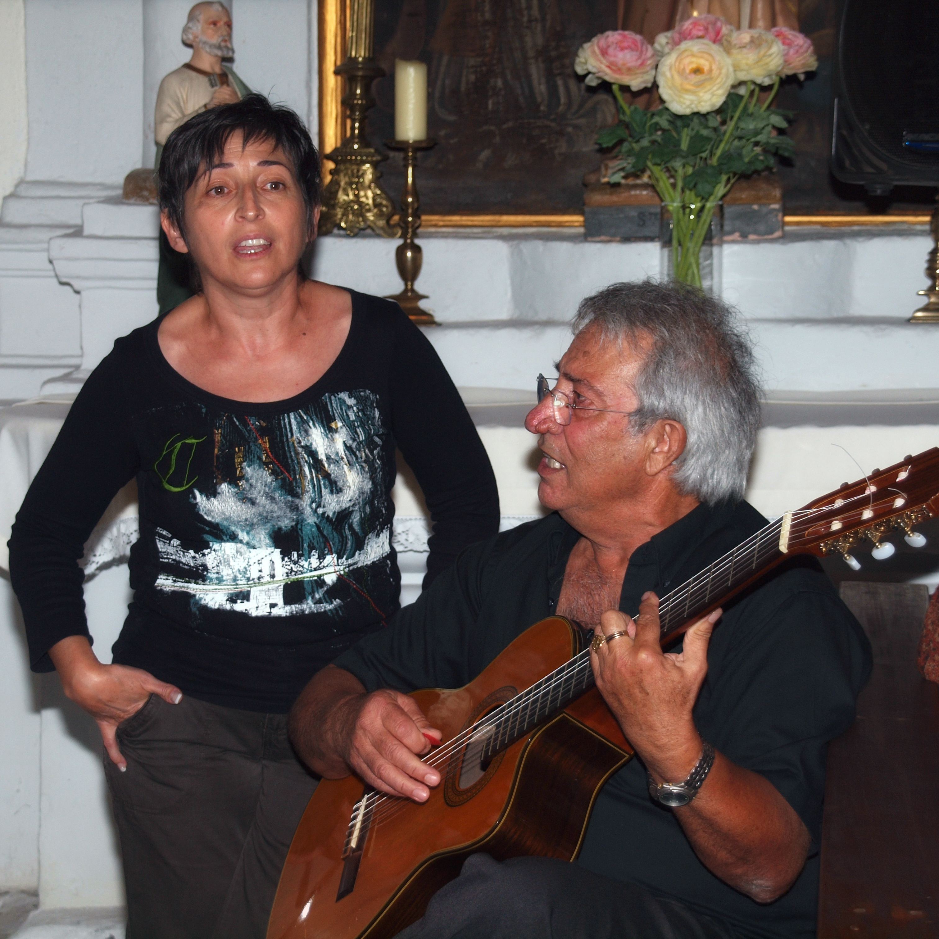 Rusio, Casaluna (Corse) - La chanteuse Anna Rocchi